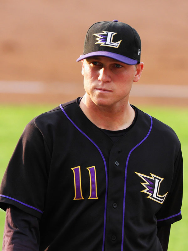 Chris Valaika